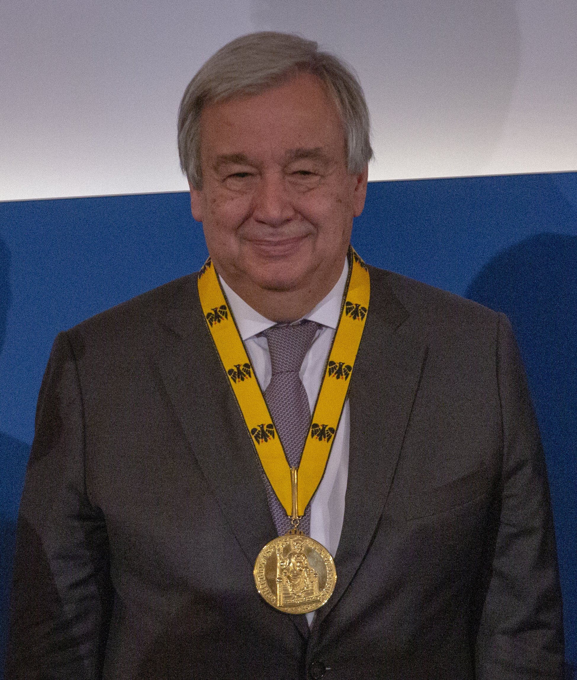 António Guterres bei der Verleihung des Karlspreis 2019